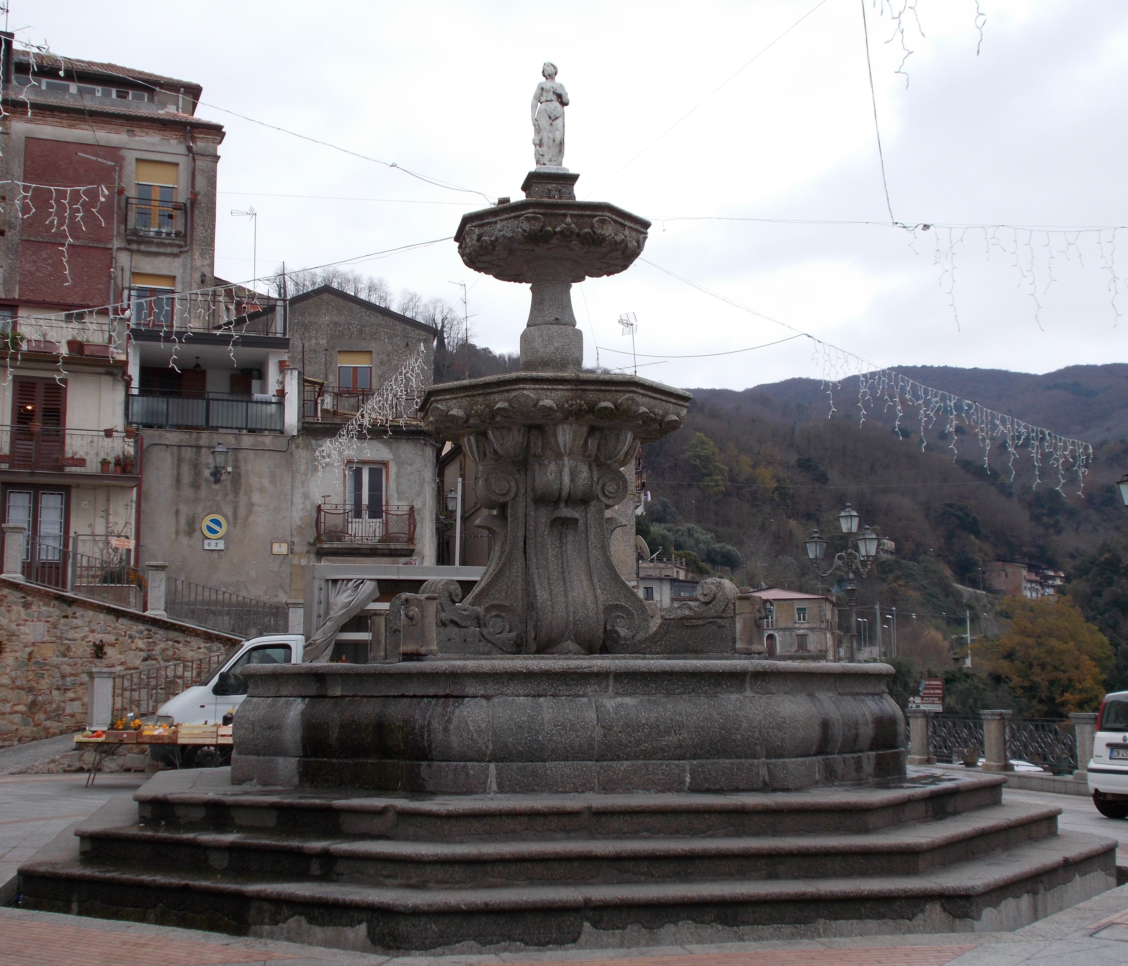 Fontana Grande simbolo del paese di San Giorgio Morgeto (R.C.). Realizzata in granito, ristrutturata nel 1664.